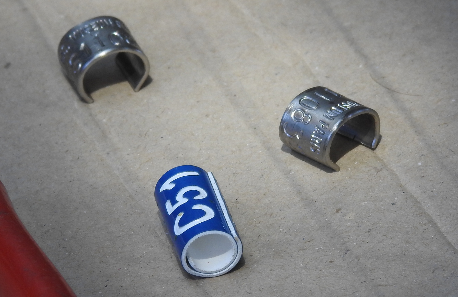 Bagues métalliques (museum de Paris) et bague darvic (ici code C51) pour avocette élégante (Recurvirostra avosetta), baguées aux Salins-d'Hyères (83) dans le cadre d'un suivi scientifique.